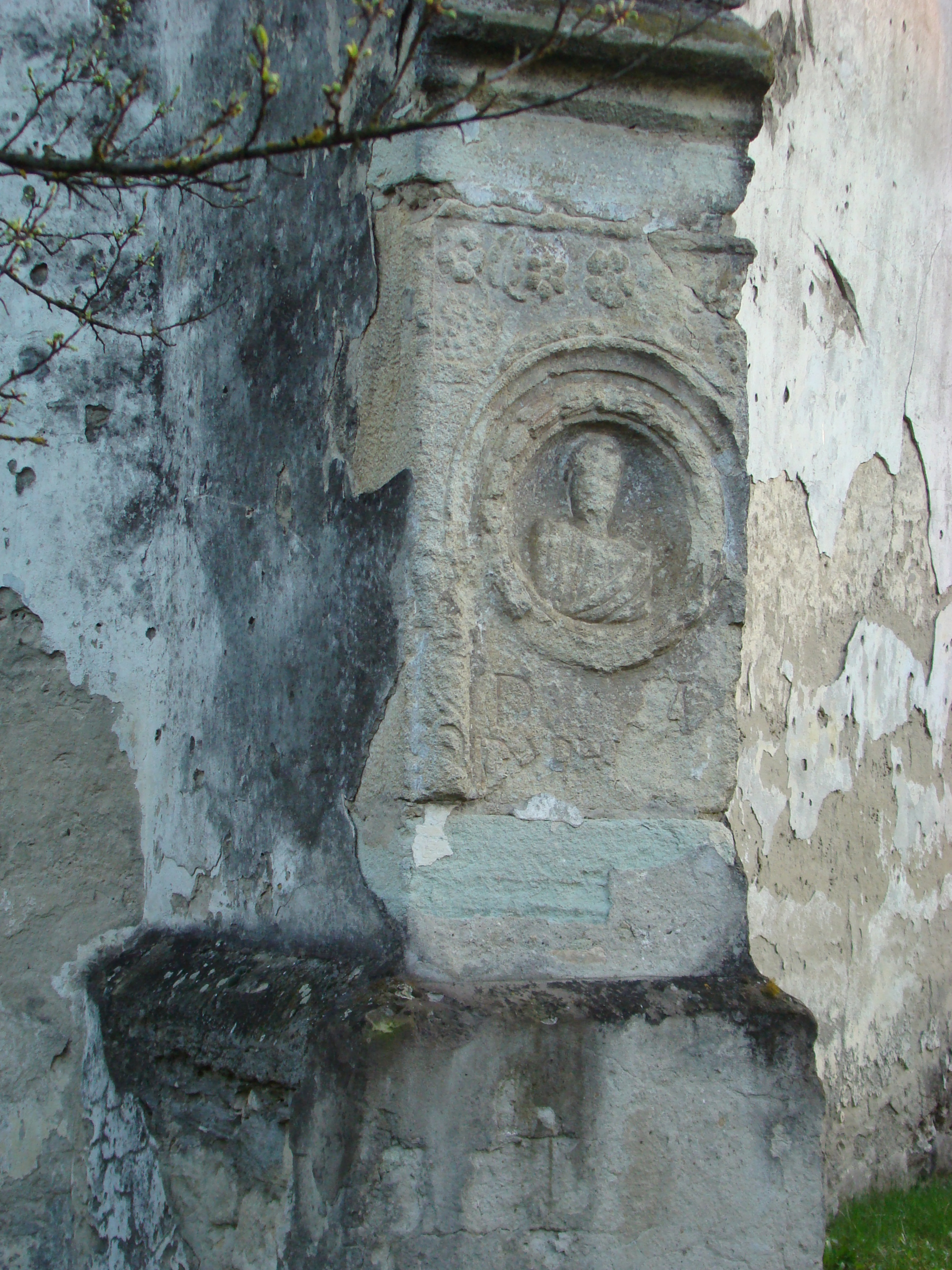 Biserica reformată, sat Mintiu Gherlii; comuna Mintiu Gherlii, județul Cluj